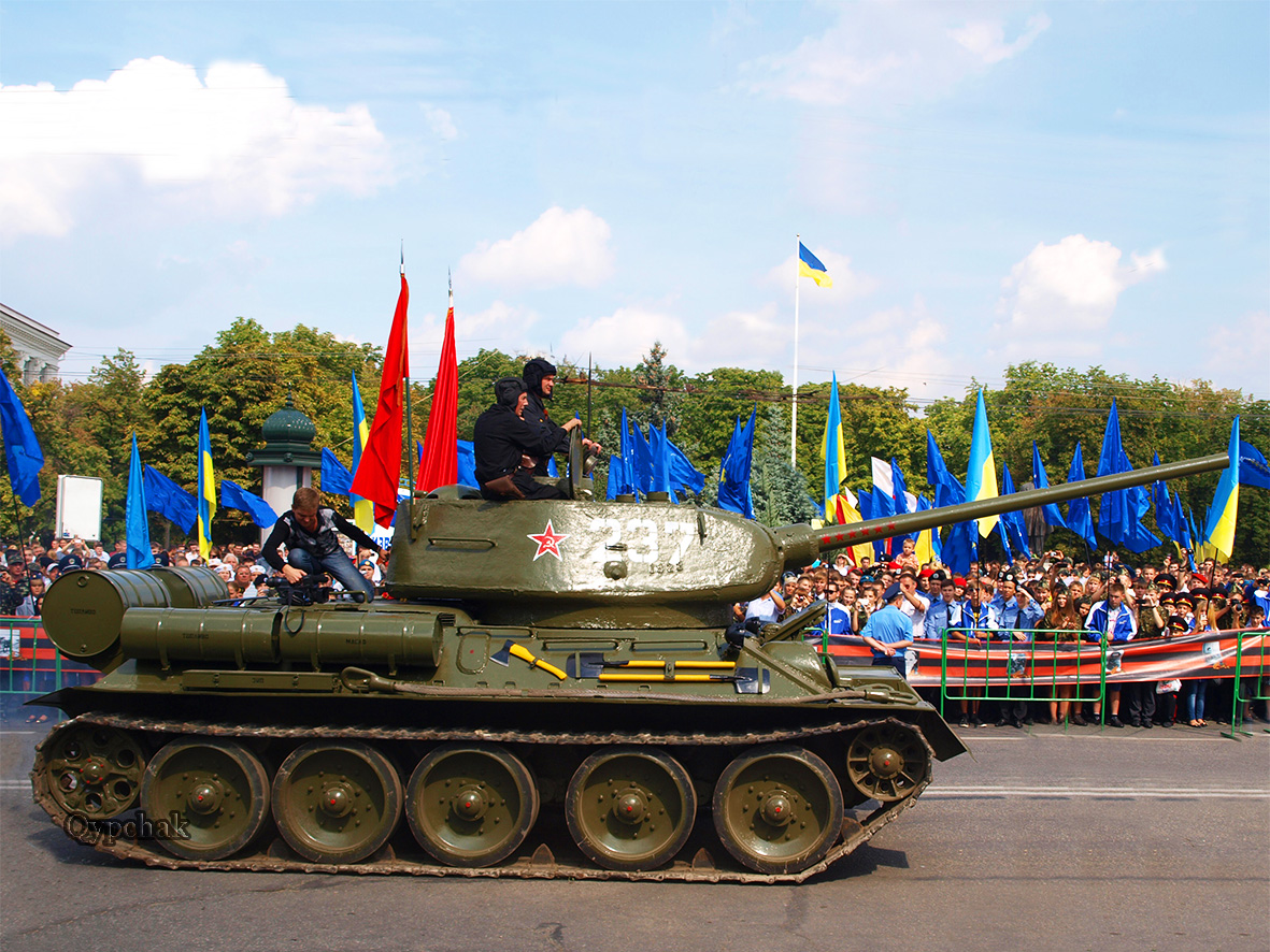 Відреставрований танк Т-34 № 237 на центральному майдані Луганська